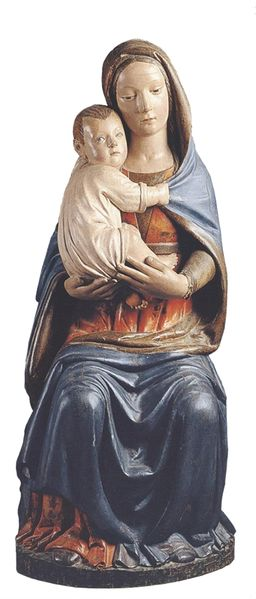 Madonna di Macereto, provenienza Santuario di Macereto, circa 1400, legno scolpito e dipinto, inserti in cuoio, tracce di doratura, h. 115 cm